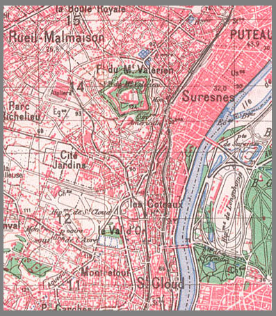 Extrait d'une carte IGN de 1950 avec la situation de l'embranchement partant de la Gare du Val d'Or à Saint-Cloud.